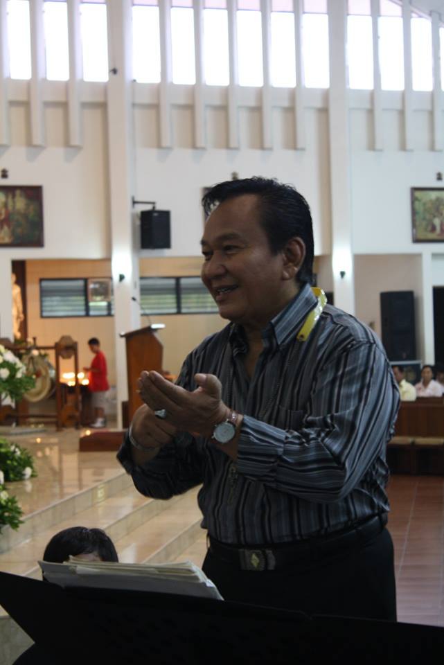 Sedang memimpin Wacana Bhakti Symphony Orchestra